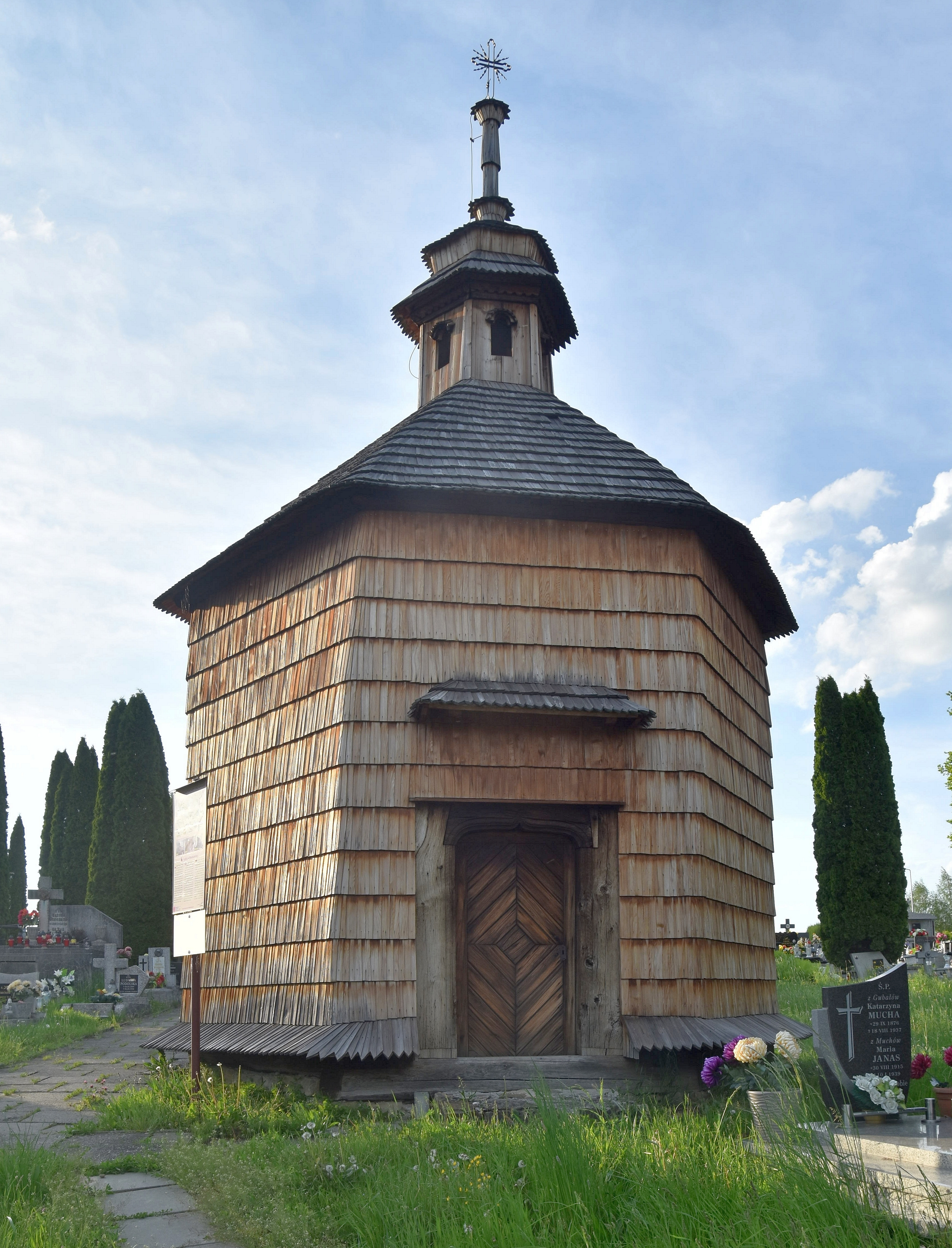 Moszczenica, kaplica Chrystusa w Ciemnicy (zab. nr 21-ZN z 1948)